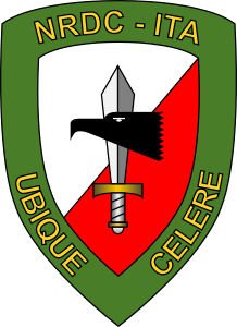 Distintivo del NATO Rapid Deployable Corps – Italy.